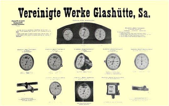 Werbeprospekt der Vereinigten Werke Glashütte (Firma Mühle) aus den 1920er Jahren